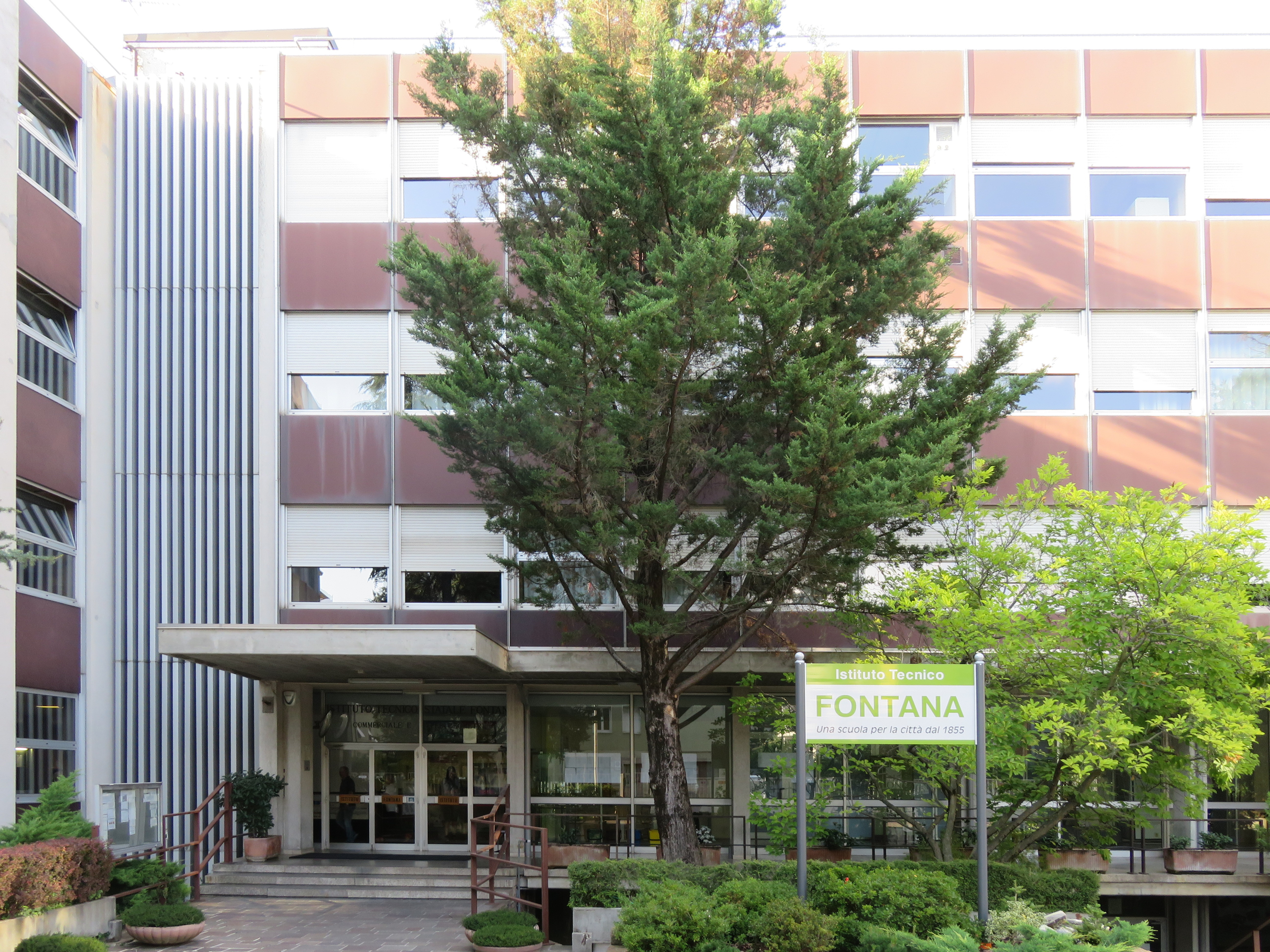 I T E T Fontana Via del Teatro 4 Rovereto